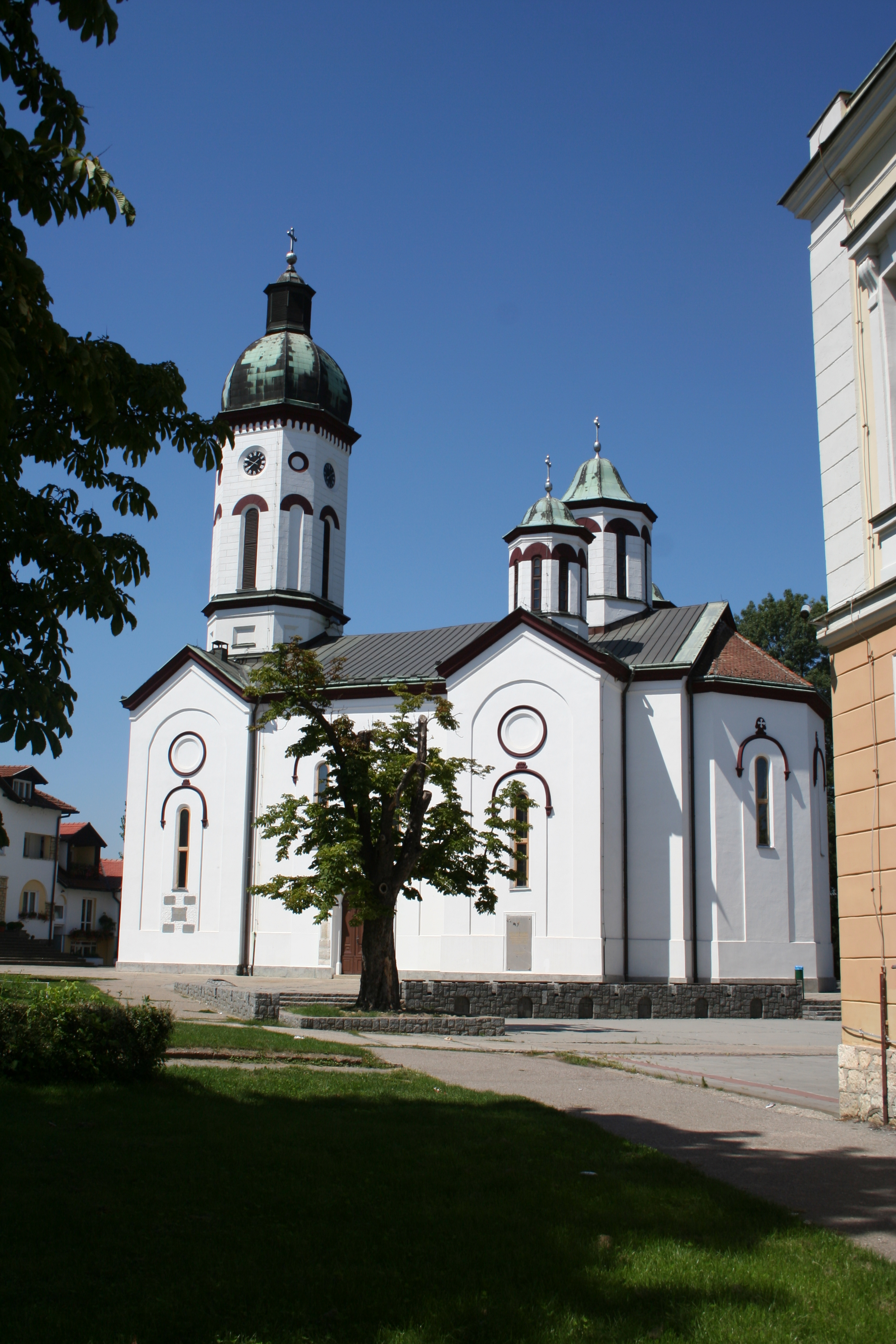 Crkva Pokrova Presvete Bogorodice, Loznica